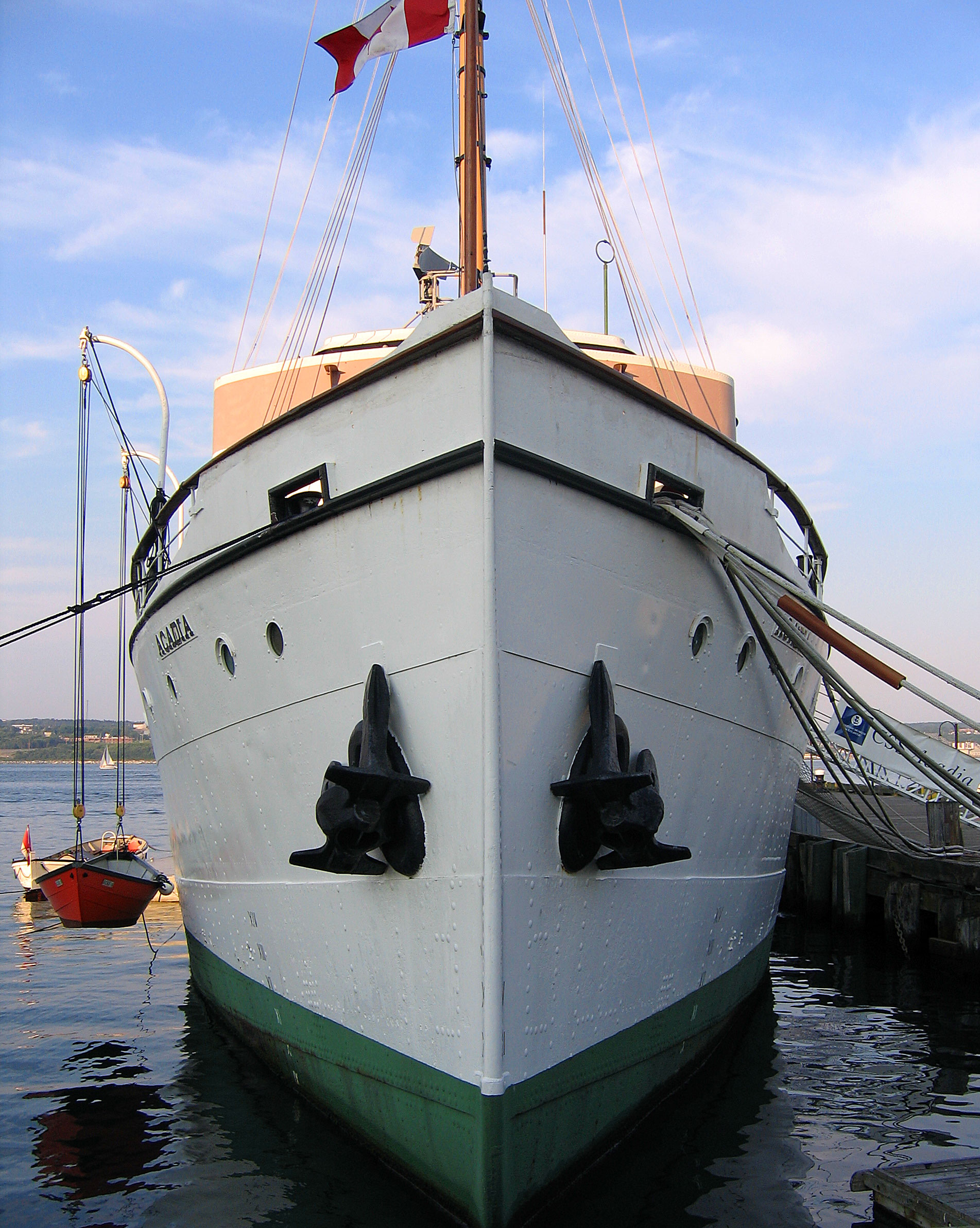 CSS Acadia, Halifax, Nova Scotia, Canada